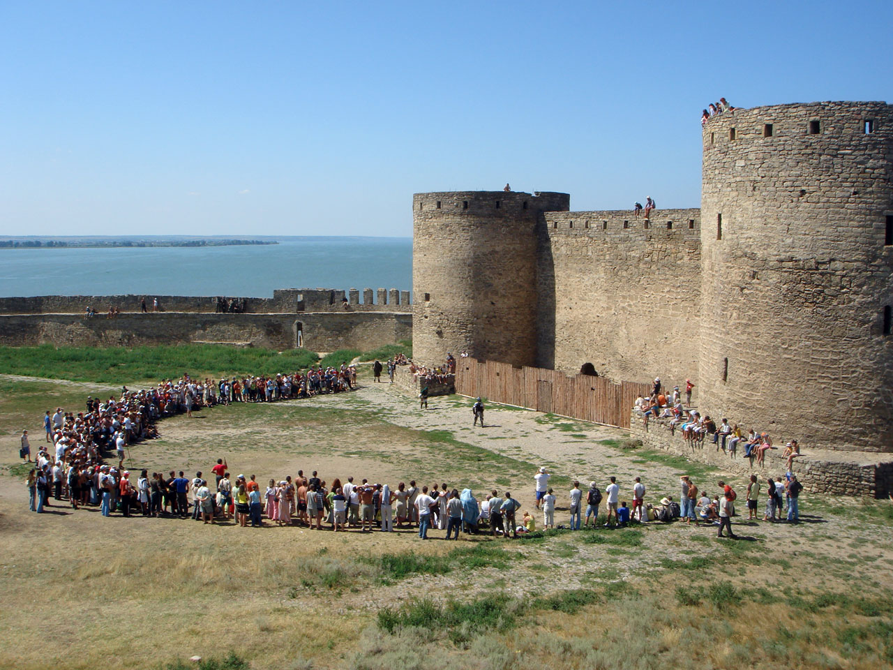 Белгород-Днестровский